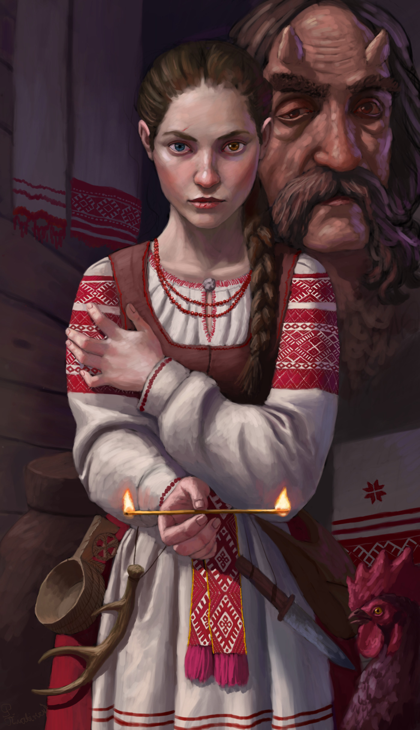 Карціна на тэму беларускай міфалогіі. Ведзьма падпаліла лучынка з двух канцоў (паводле народных павер'яў, такая лучынка адчыняла таемныя скарбы і склепы). На заднім плане - твар чорта Аніскі. Як верылі ў Беларусі, ён жыве ў кожнай бані, і галава ў яго памерам з піўны кацёл.